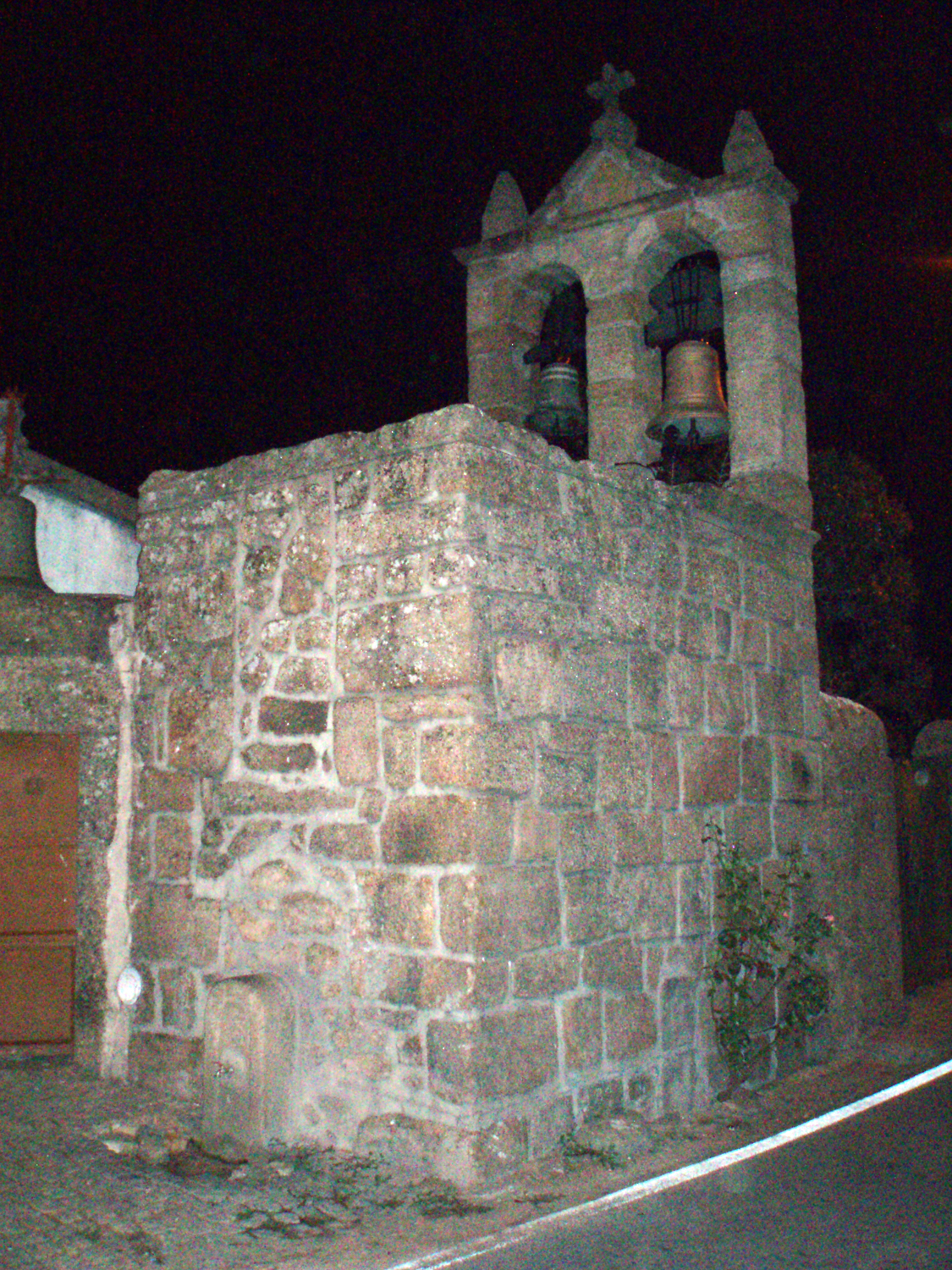 Campanario da Igreja Matriz de Aldeia de Santa Margarida